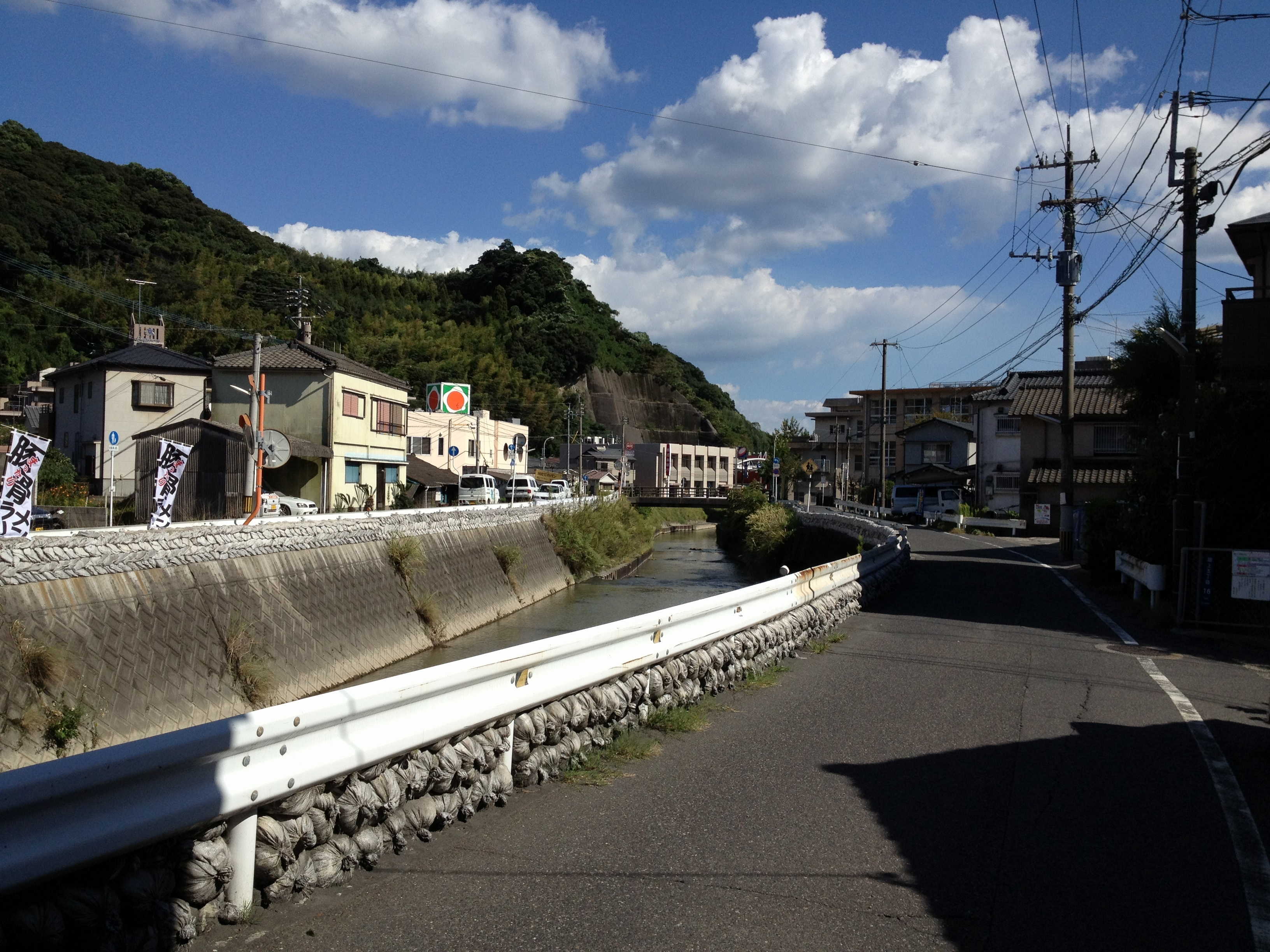 鹿児島市田上を流れる新川。